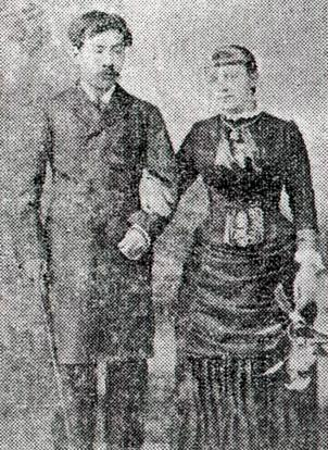 明治17年 ドイツ アルザス シュトラースブルクに於いて新婚当時の髙橋夫妻